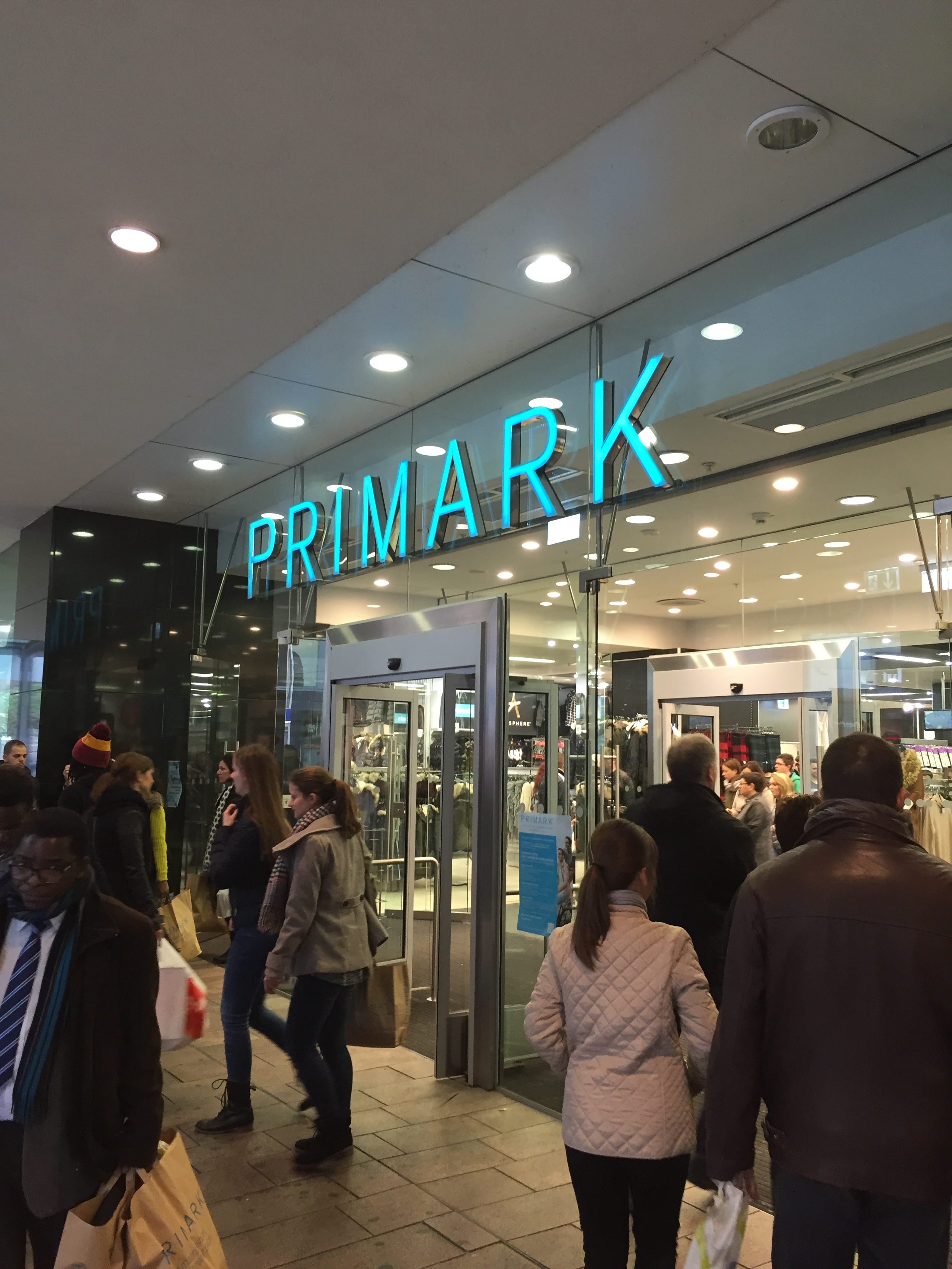 Primark Shop